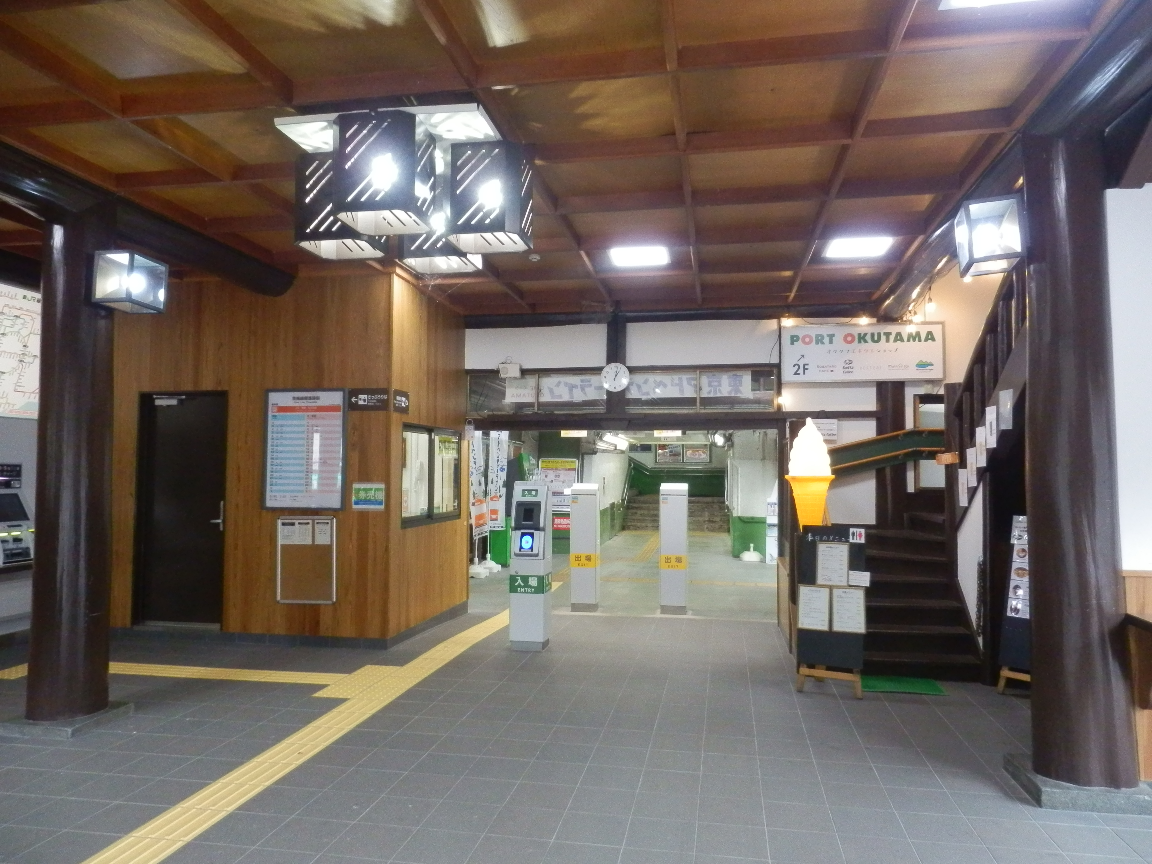 奥多摩駅改札